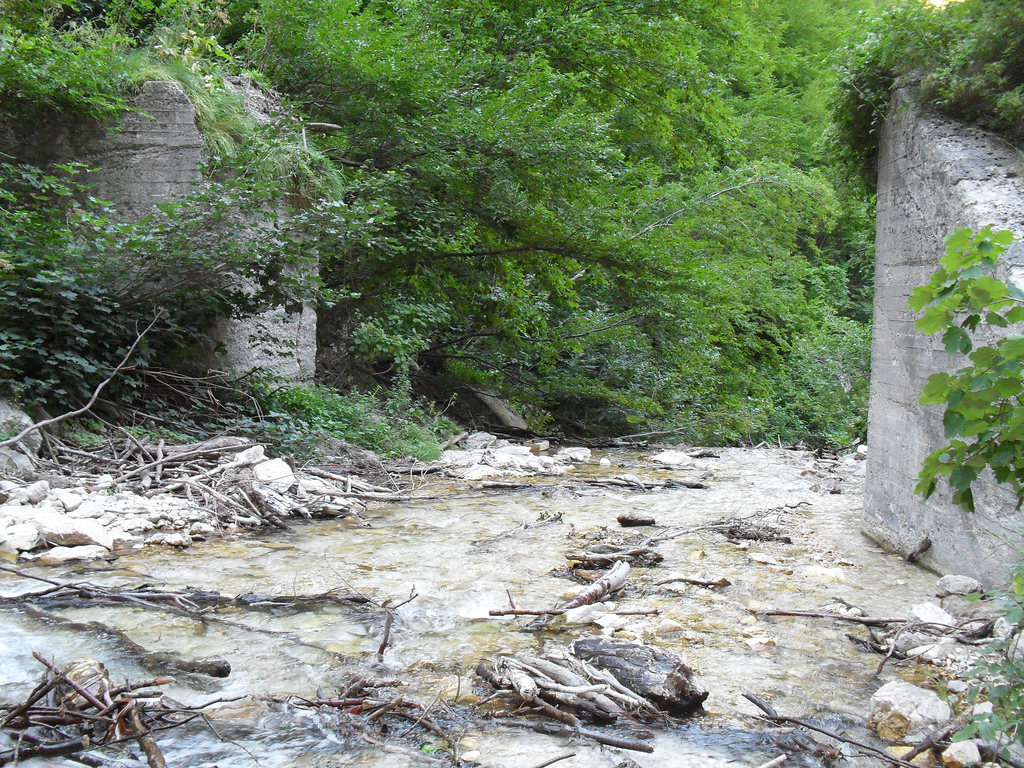 Foto del Fiume Tenna